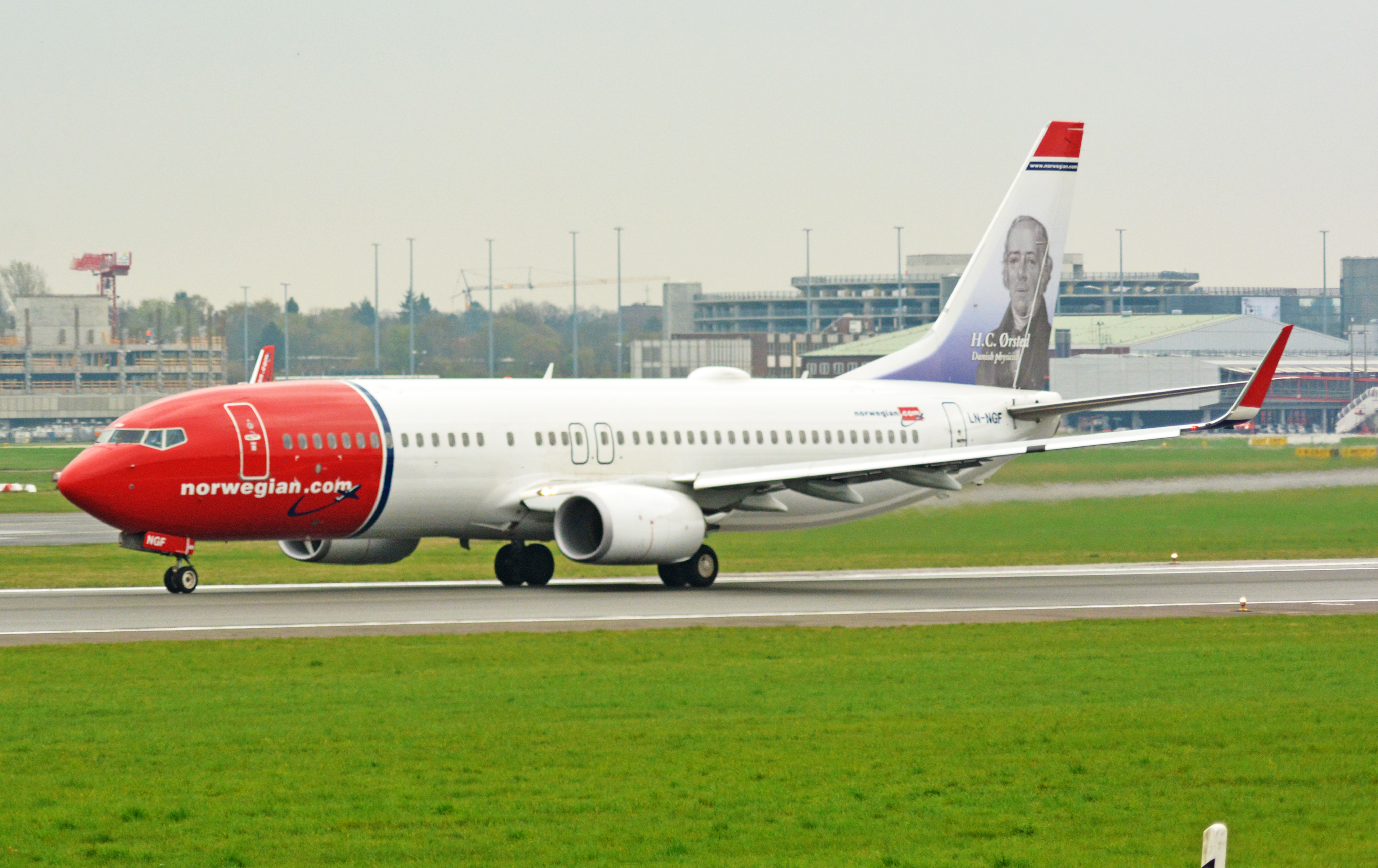 Boeing 737-8Q8 (LN-NGF) auf dem Hamburg Airport.